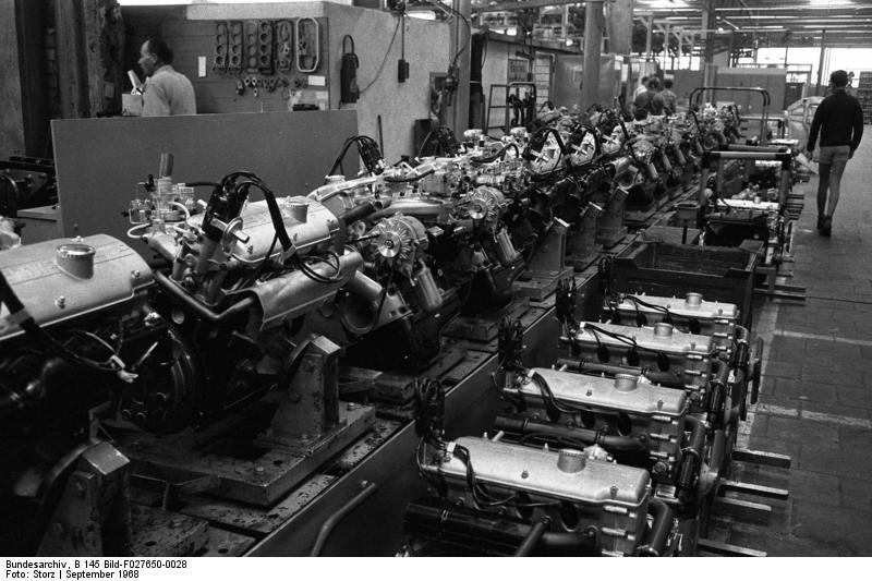 Autowerk BMW-München